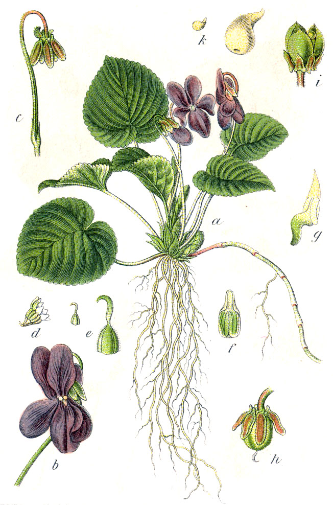 Viola odorata L. Original Caption Echtes Veilchen, Viola odorata